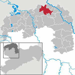 Trossin in Saxony - Landkreis Nordsachsen